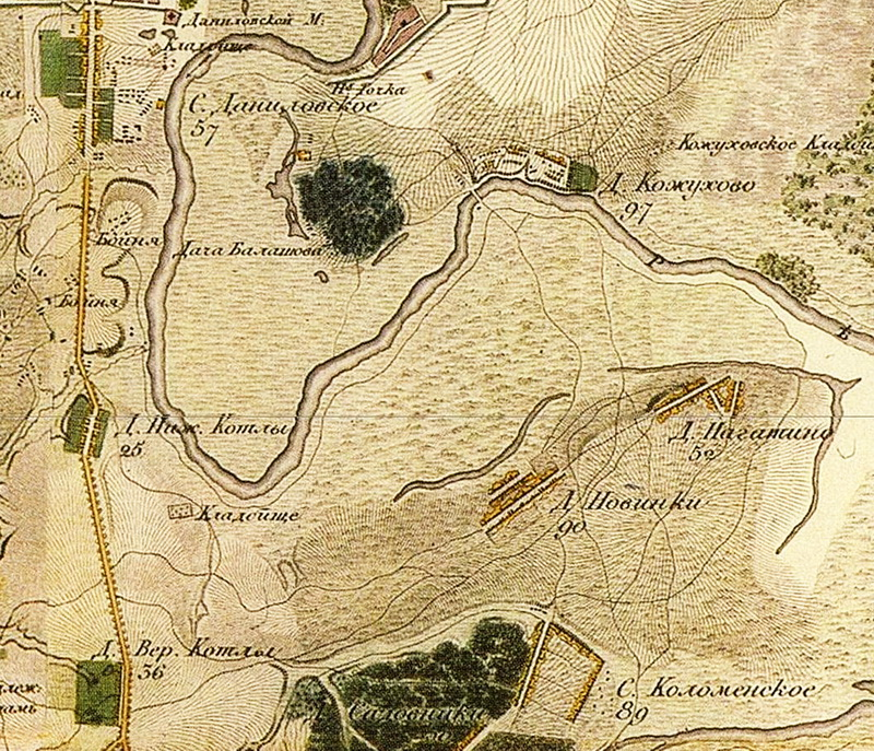 Нагатино, Новинки, Кожухово на карте 1818 года